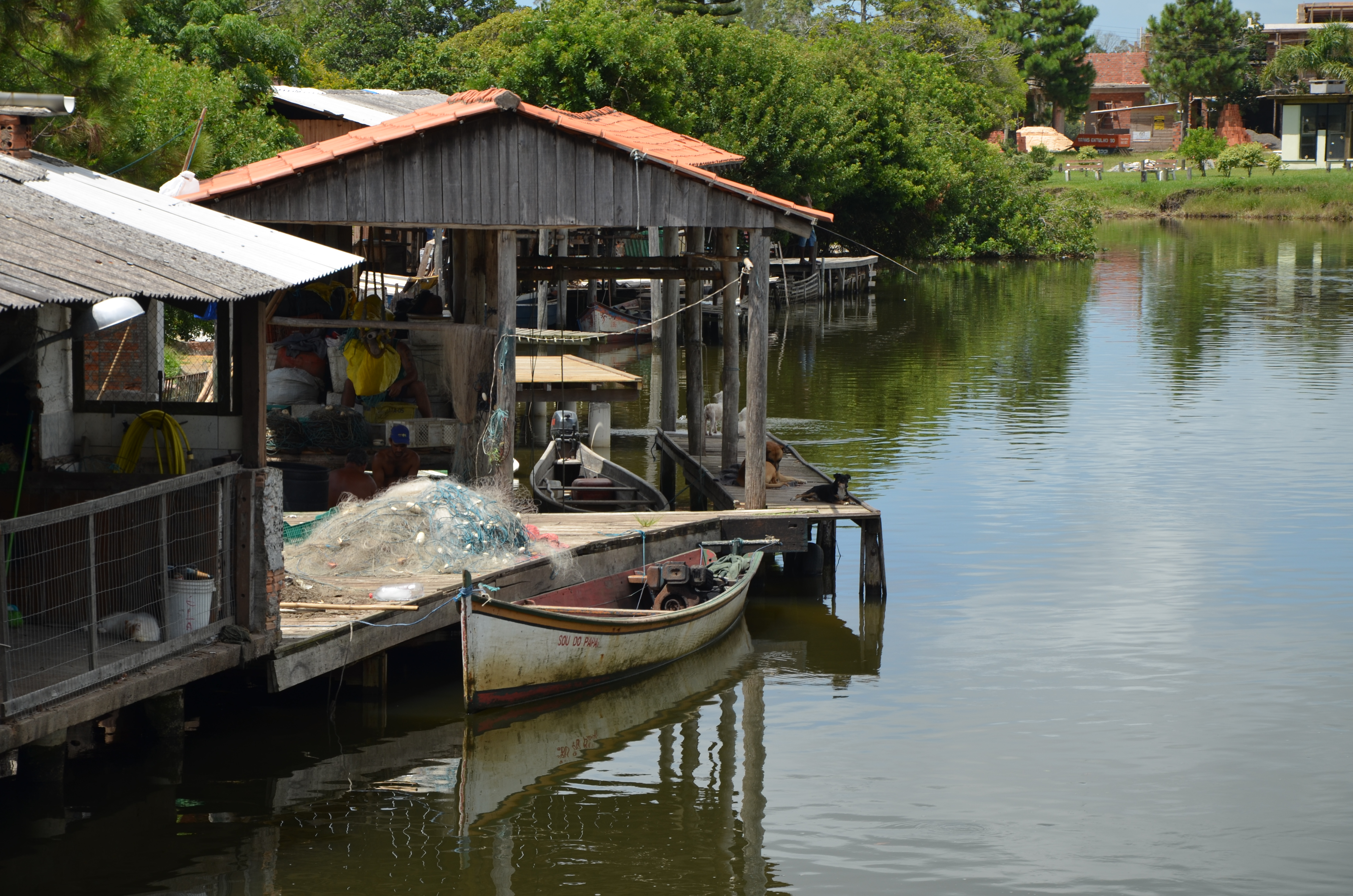 Rio Tramandaí, ponte dos camarões